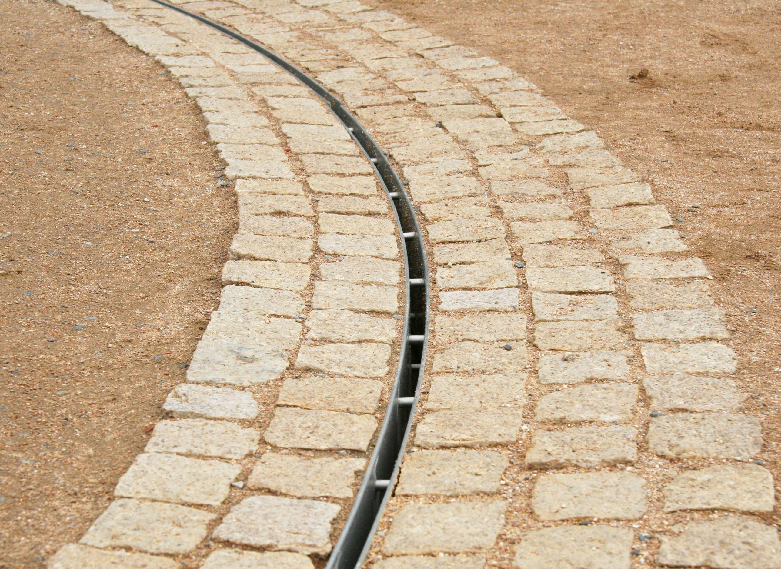 Schlitzrinne zur Entwässerung von Oberflächenwasser, mit Kleinsteinpflaster eingefasst